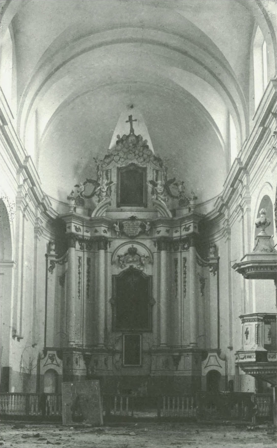 Беларуская (тарашкевіца): Вістычы (Vistyčy). Касьцёл Сьвятой Соф'і і кляштар цыстэрыянаў